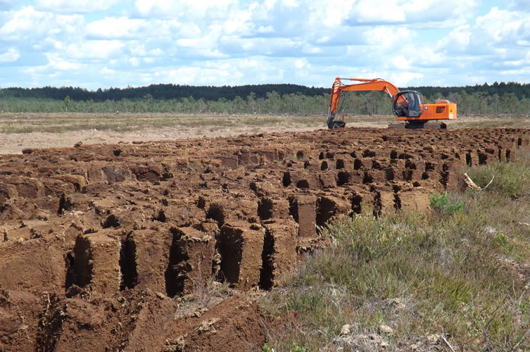 Гальский мох